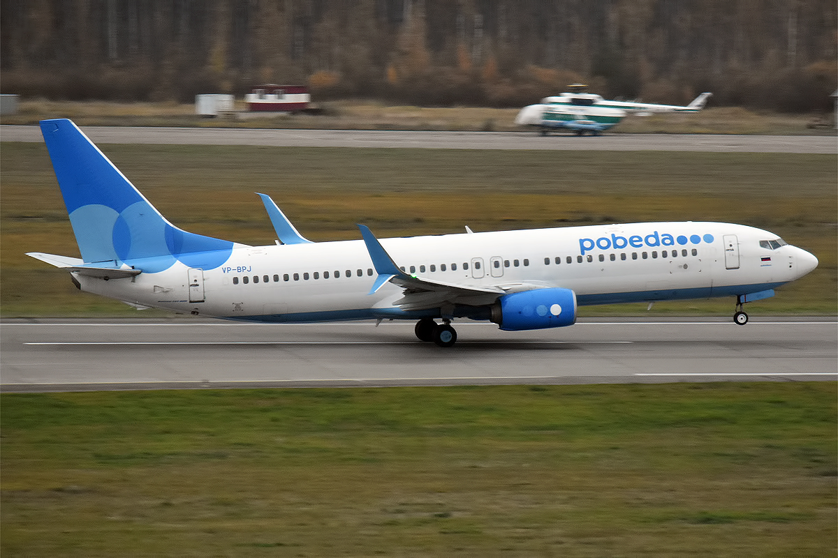 Pobeda, VP-BPJ, Boeing 737-8AL